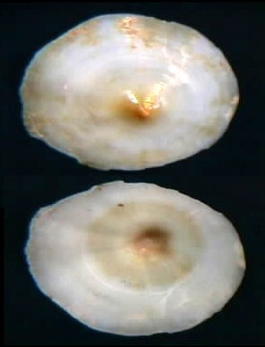 Umbraculum umbraculum (Lightfoot, 1786) (Sombrero Chino), Carupano estado Sucre - Venezuela.